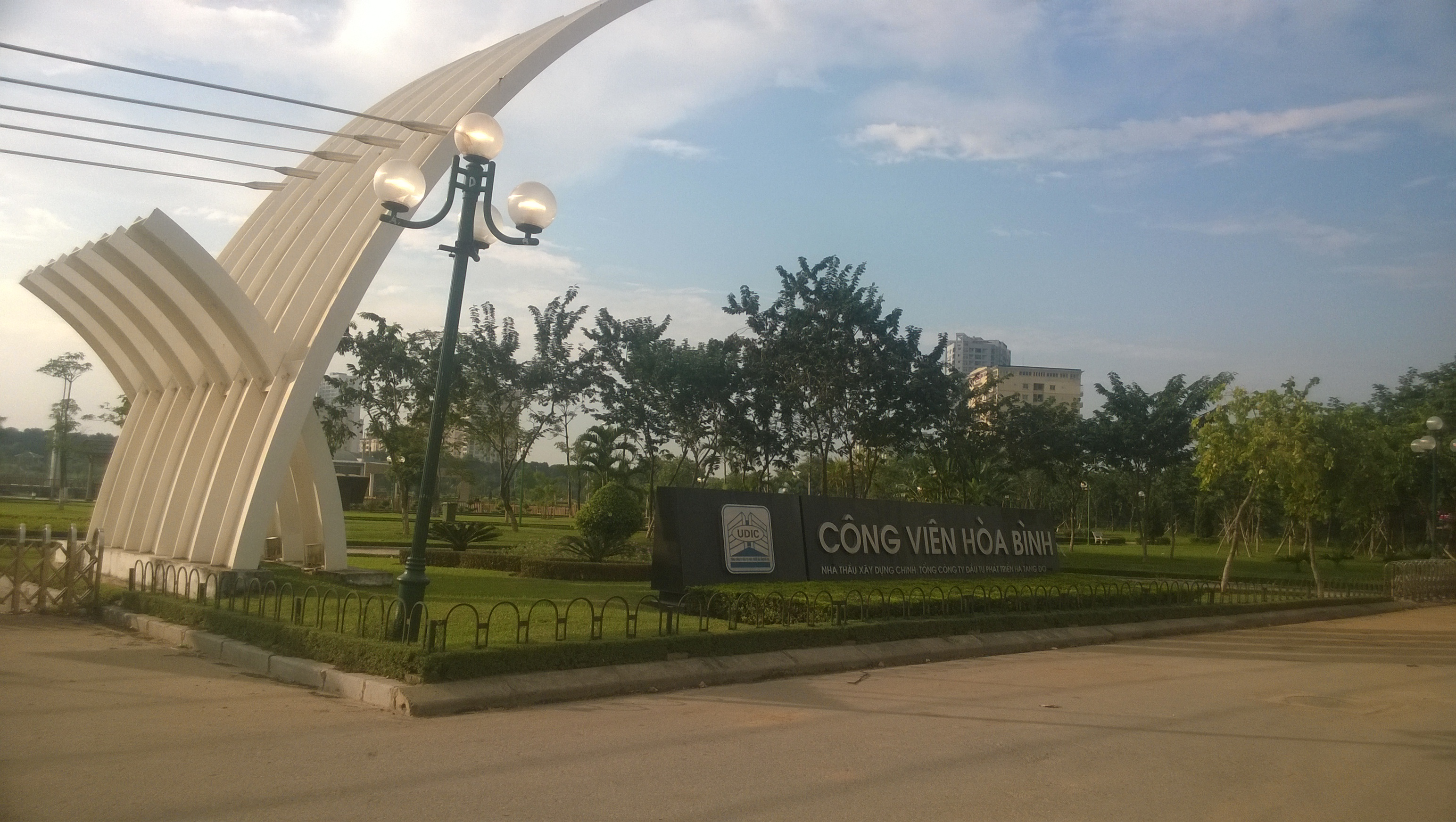 Công Viên Hòa Bình